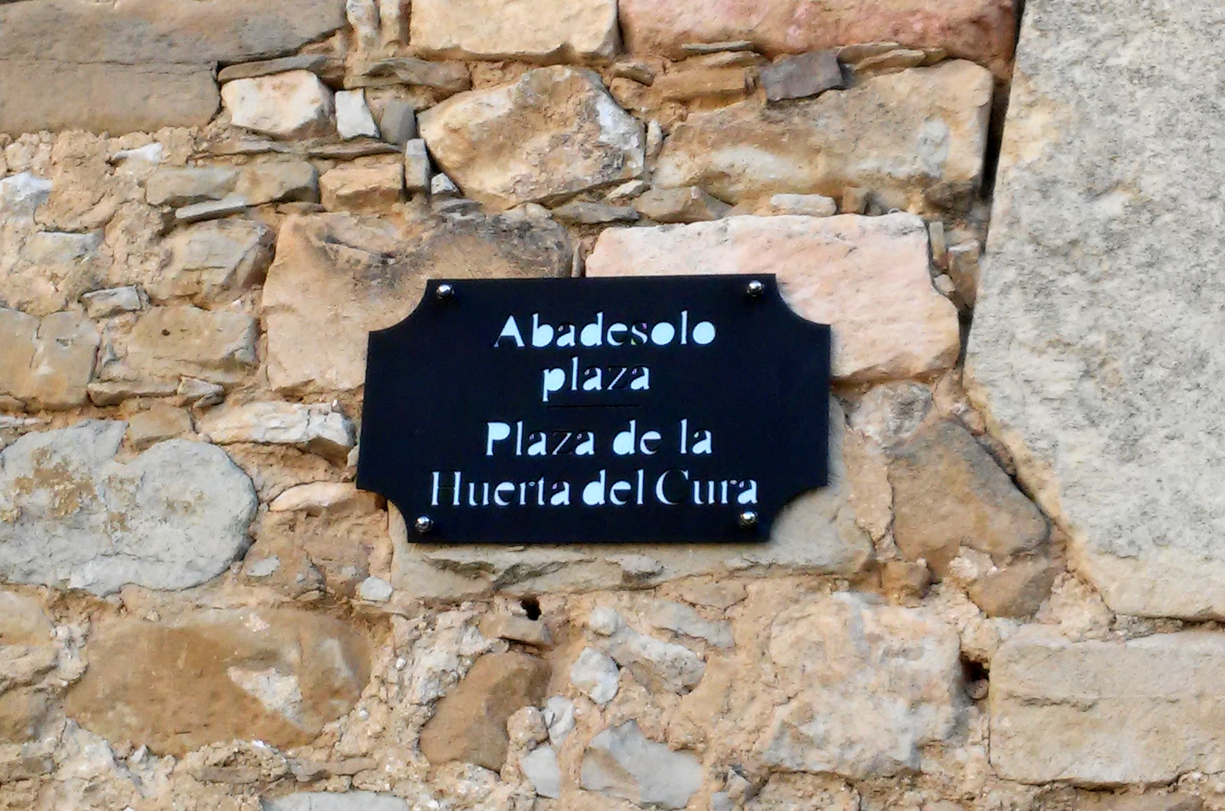 Trebiñu herriko Abadesolo kalea